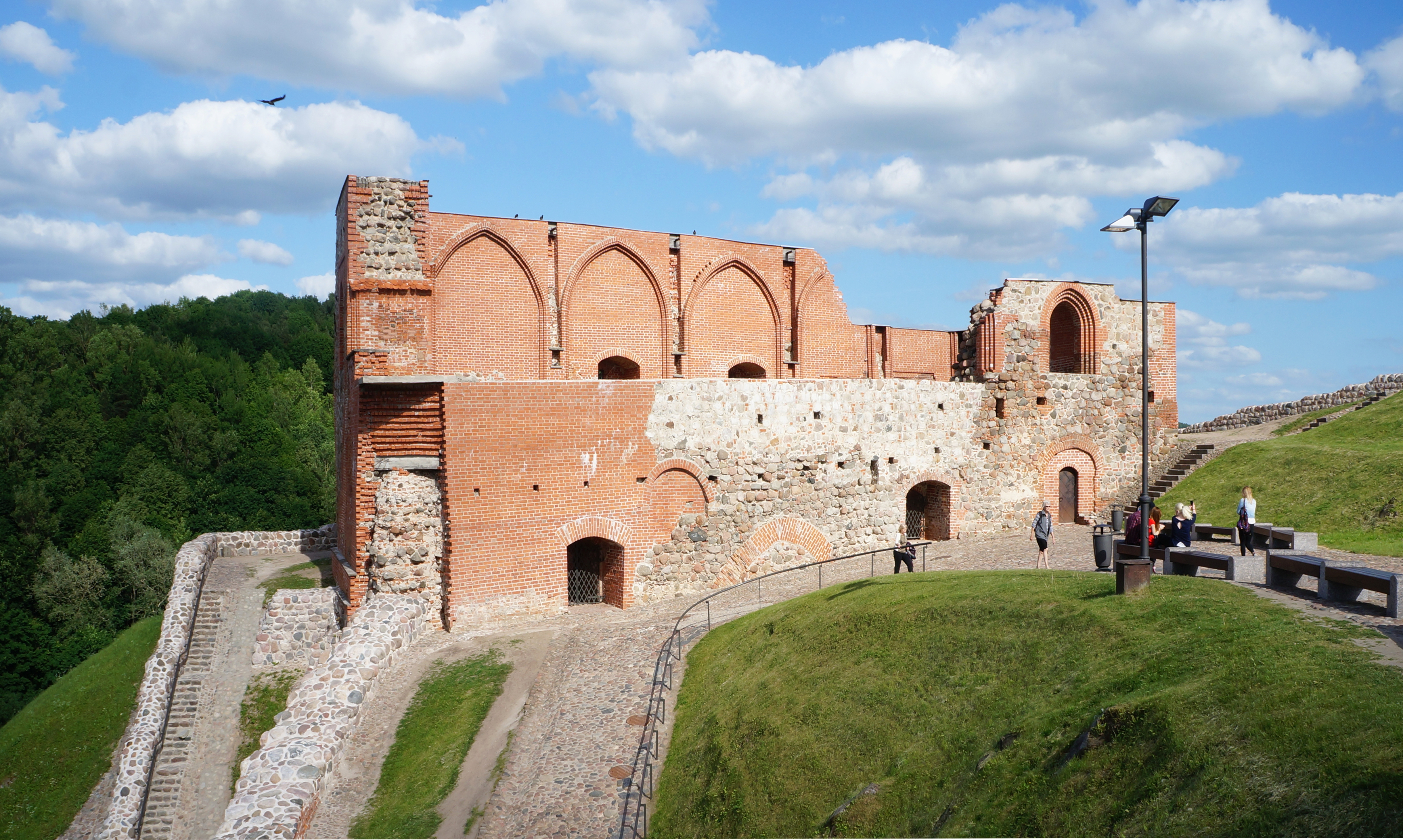 La Tour de Gediminas, vestiges du Château de Vilnius en Lituanie.